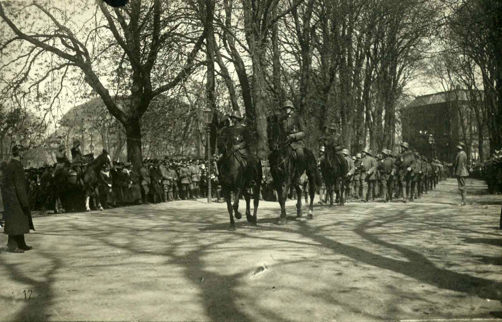 Braunschweig, Novemberrevolution in Braunschweig, 7. April 1919: Truppen des Freikorps Maercker paradieren auf dem Löwenwall.